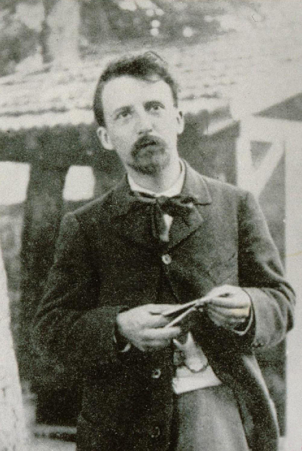 Pottecher Maurice, Mi-corps, face. Bibliothèque nationale et universitaire de Strasbourg